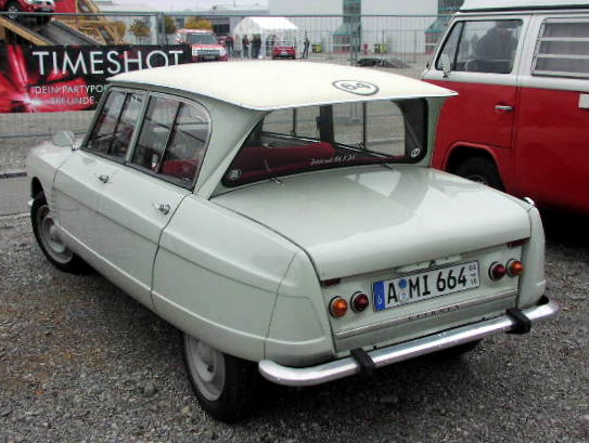 Citroen Ami 6 (1964)